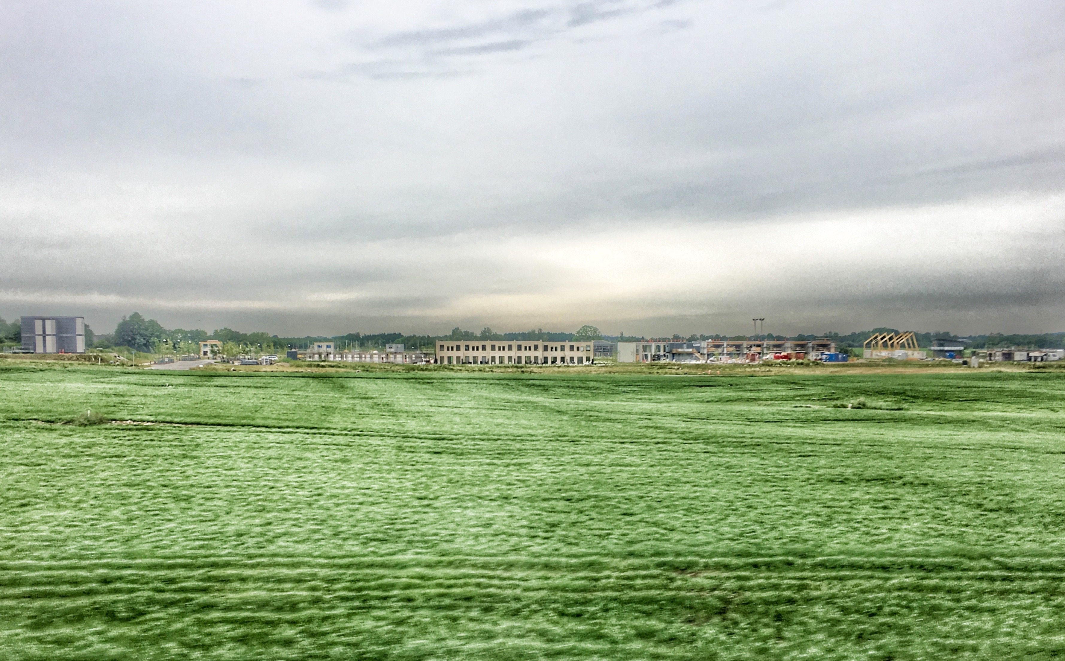 Deltahusene, Okavangovej i Vinge - en kommende by ved Frederikssund, Sjælland